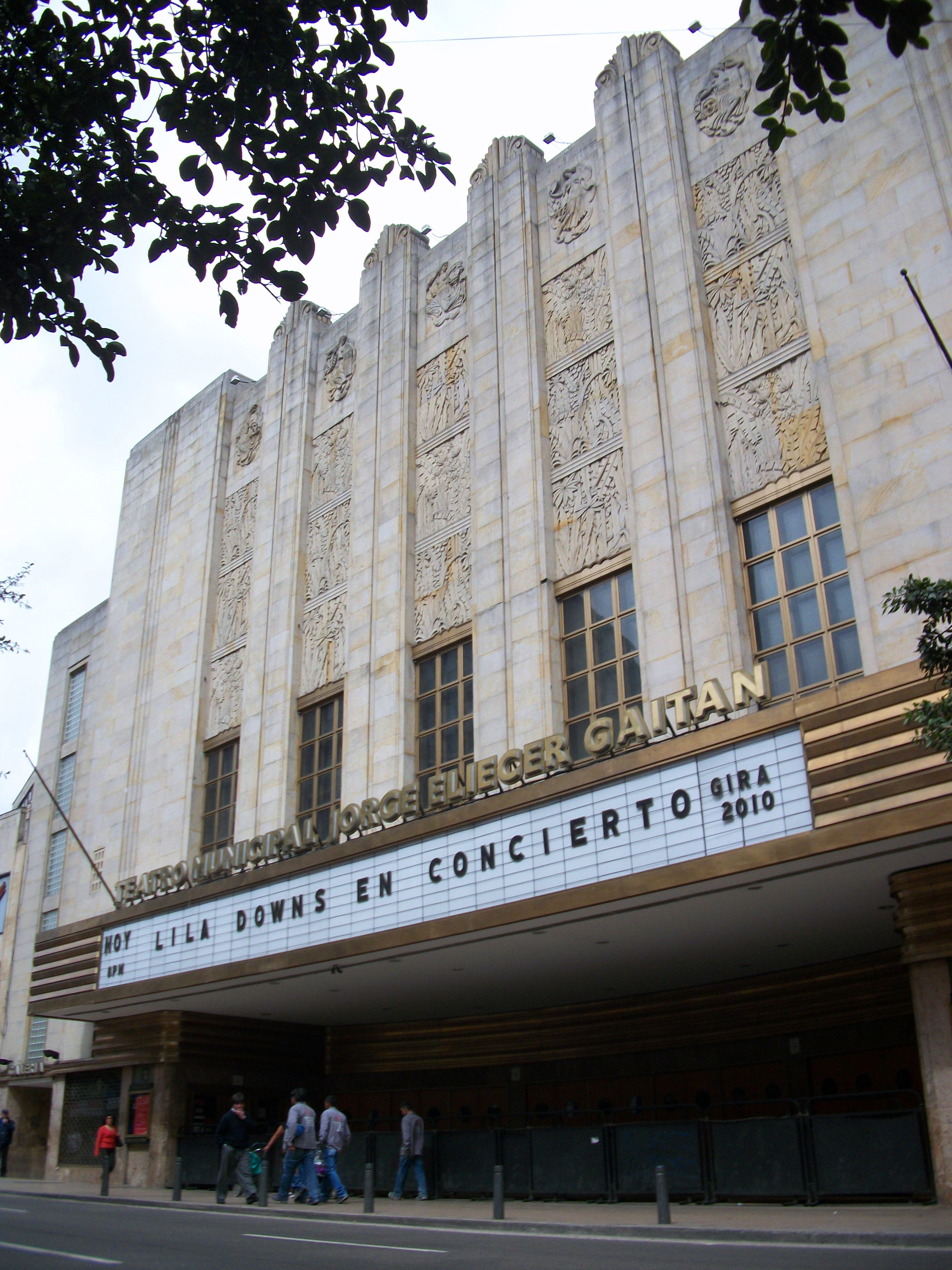 Teatro Jorge Eliécer Gaitán en Bogotá.